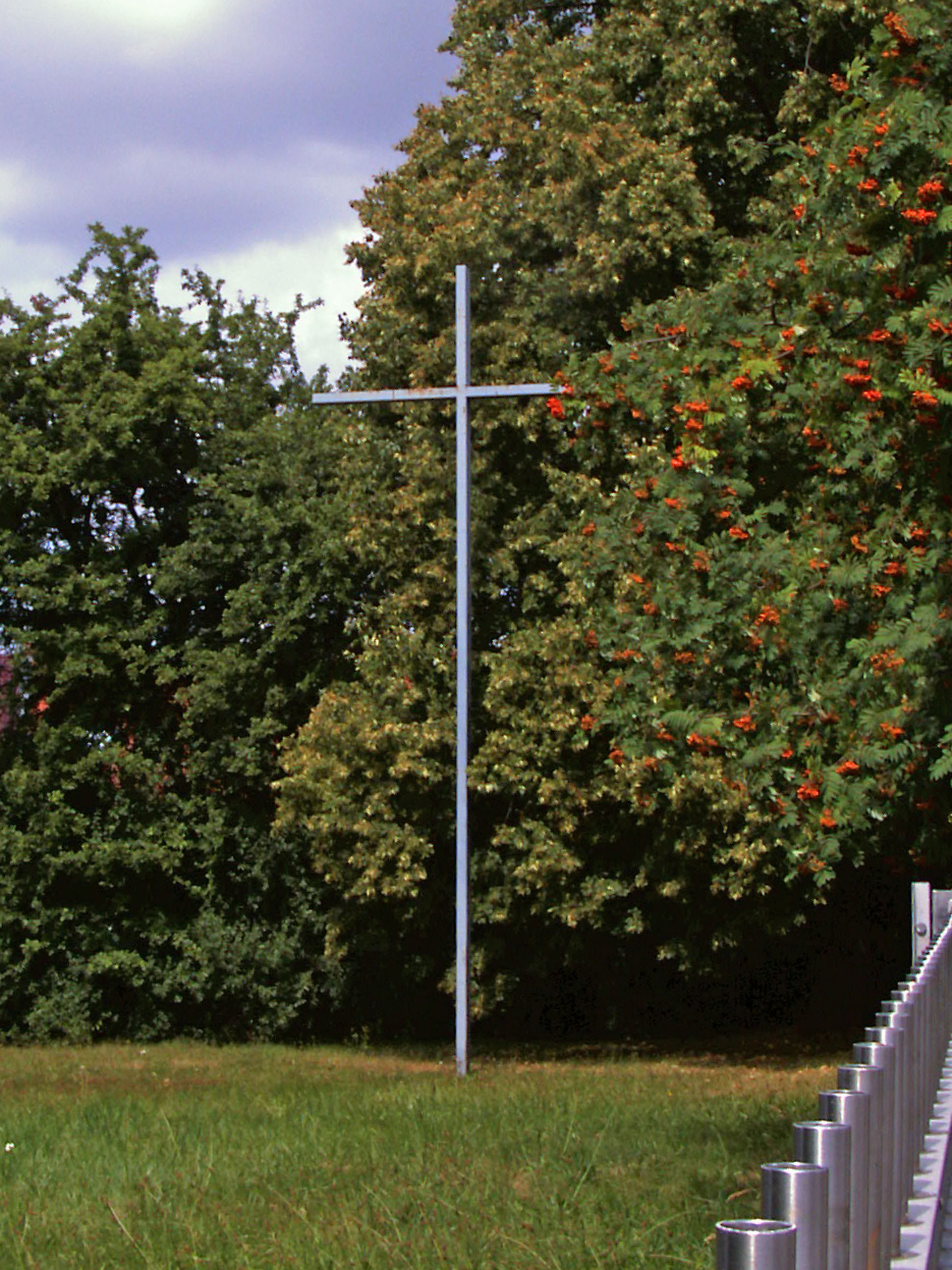 Kreuz nahe dem ehemaligen katholische Kirchhaus St. Christophorus in Dörnten.